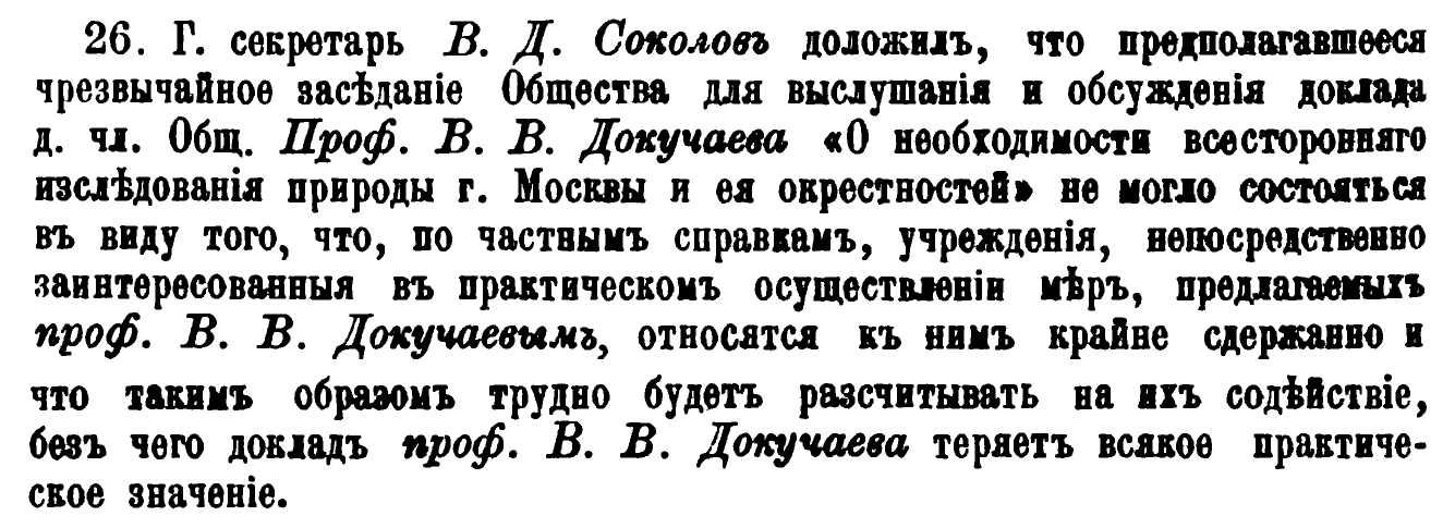 Протоколы заседания МОИП 21 сентября 1900 года.